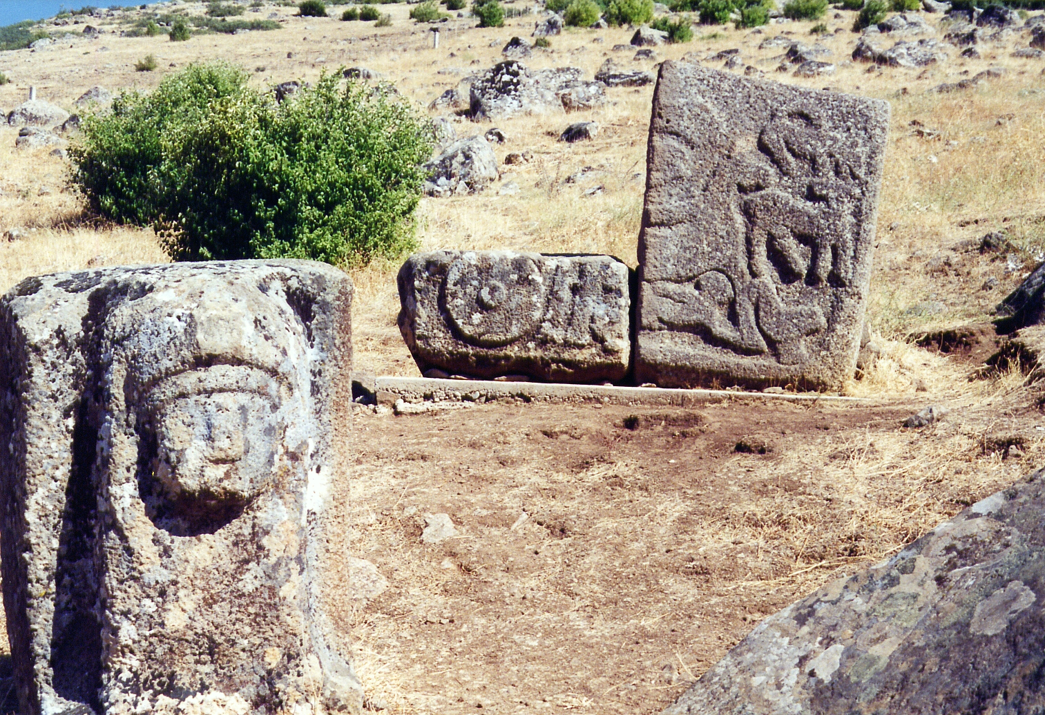 Yesemek, Hethitische Bildhauerwerkstatt, Südosttürkei, Relief mit Streitwagen